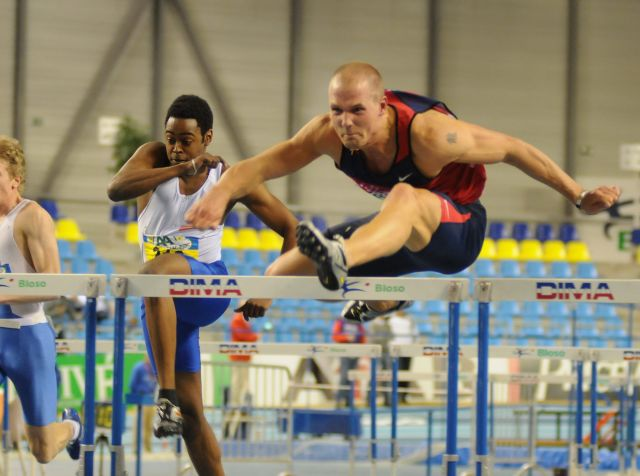 Marcel van der Westen Dutch Indoorchampionships 2008 in Gent